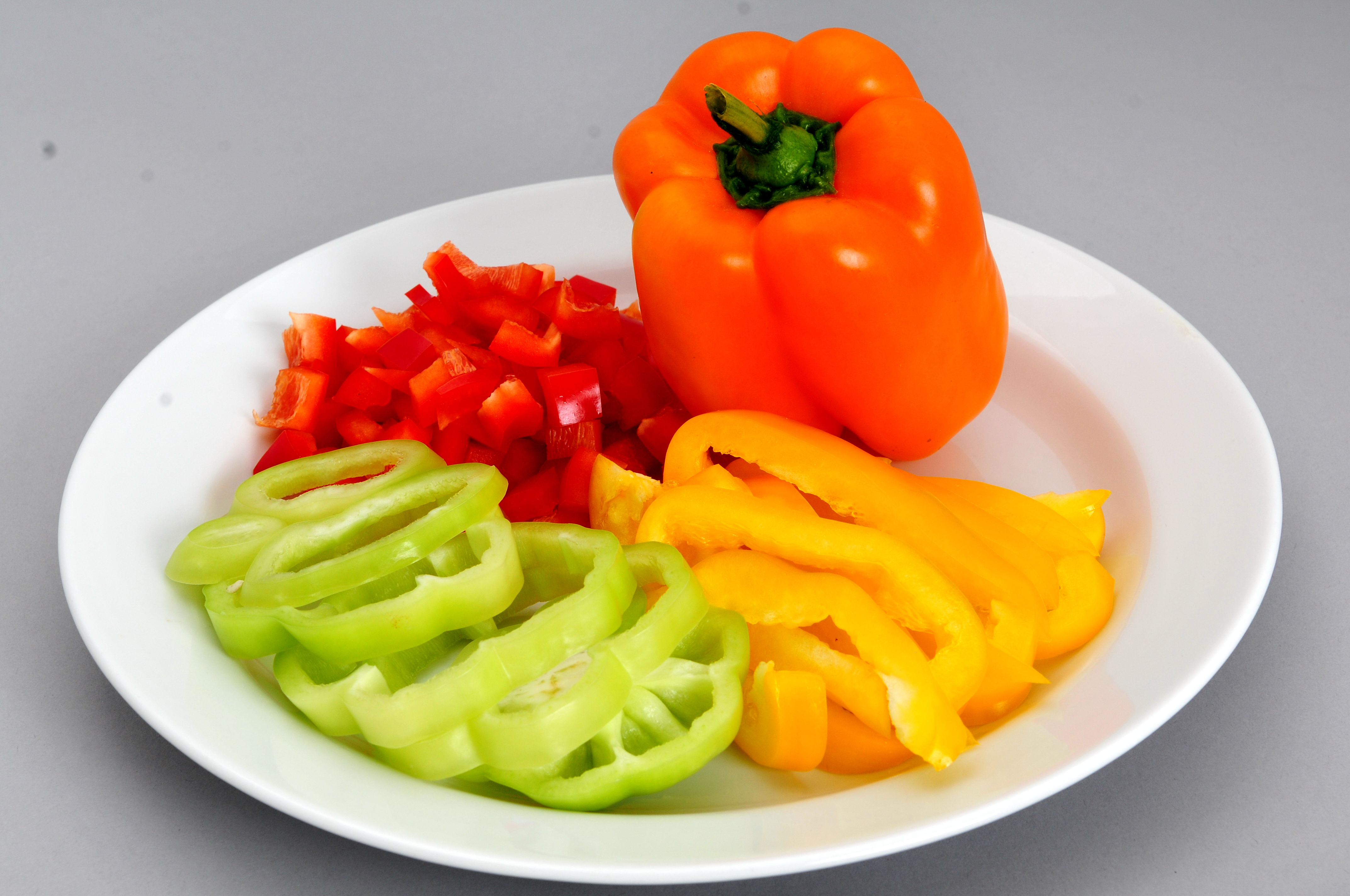 Treffen der Redaktion Essen und Trinken ion Wien